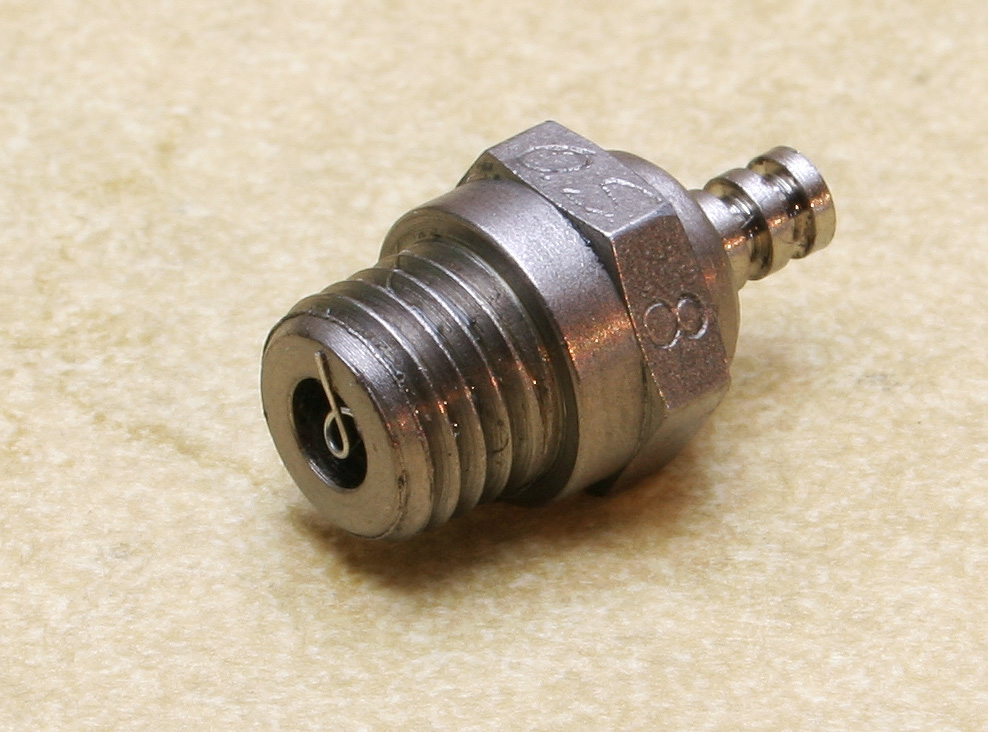 Glühkerze der Firma OS (Nr. 8)